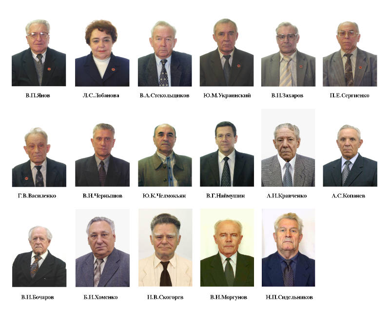 Почётные ветераны ВЭлНИИ на 1 ноября 2013 года